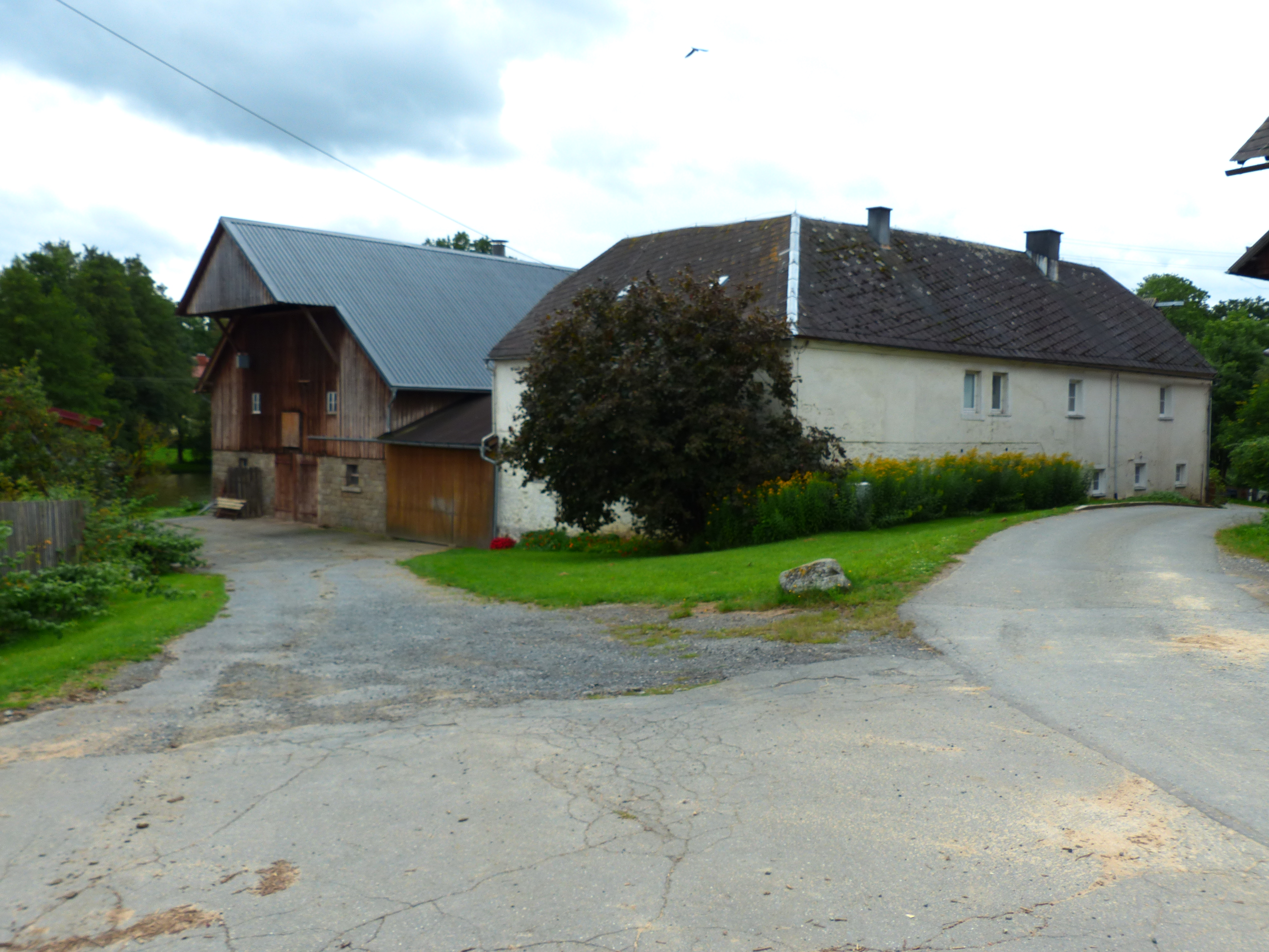 Ansicht von Unterpferdt, Ortsteil von Konradsreuth